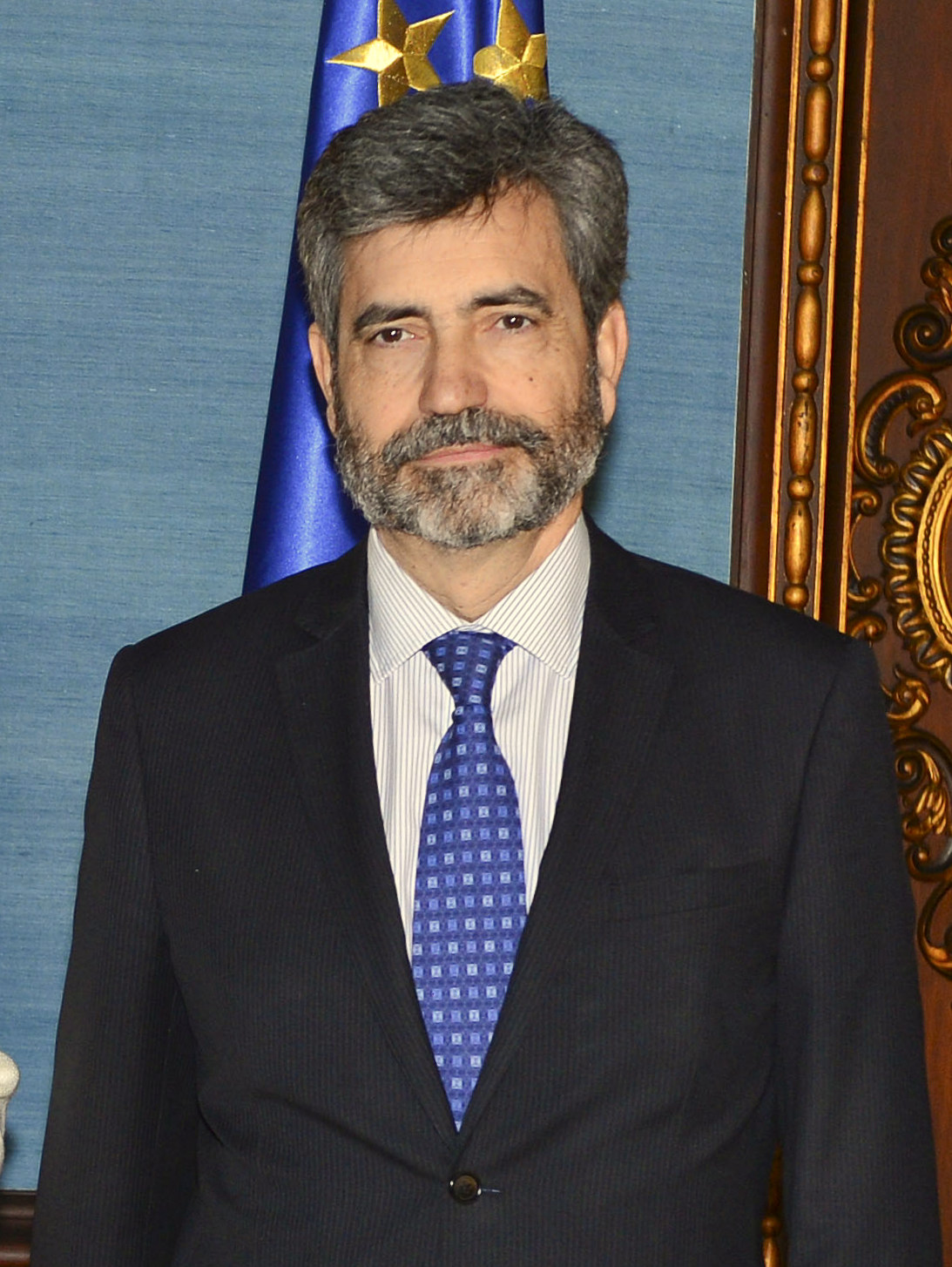 Carlos Lesmes, presidente del Consejo General del Poder Judicial.